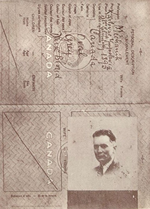 Srpskohrvatski / српскохрватски: Fogografija lažnog pasoša Josipa Broza na ime kanadskog državljanina Spiridona Mekasa, pod čijim imenom se vraćao iz Moskve u Jugoslaviju 1939.